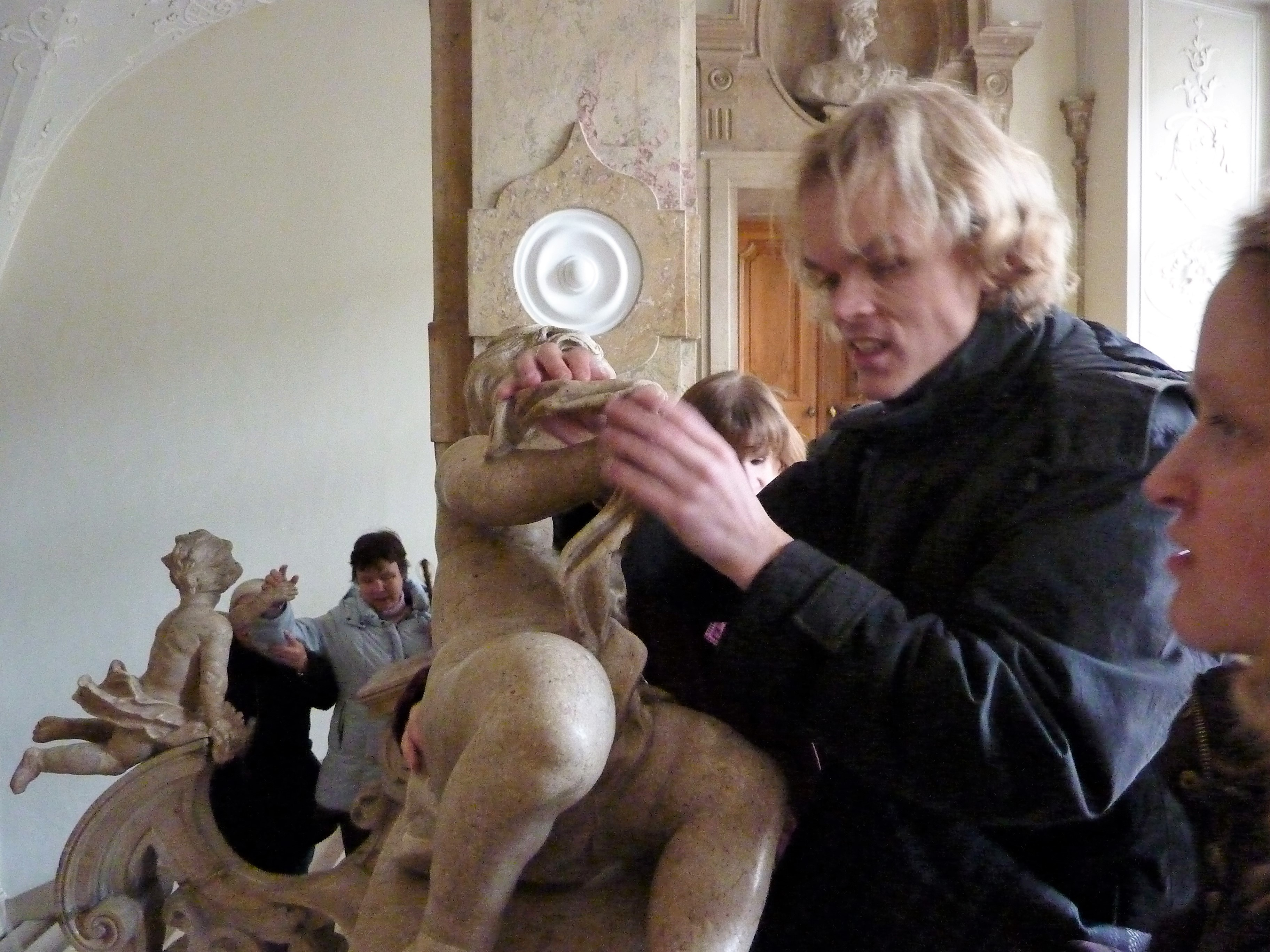 Geführter Rundgang für Blinde und Sehbehinderte im Schloss Mirabell in Salzburg, Österreich; hier beim Betasten von historischen Skulpturen in einem Treppenaufgang des Schlosses.